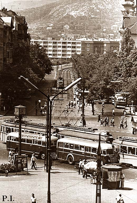 Móricz Zsigmond körtér - Budapest